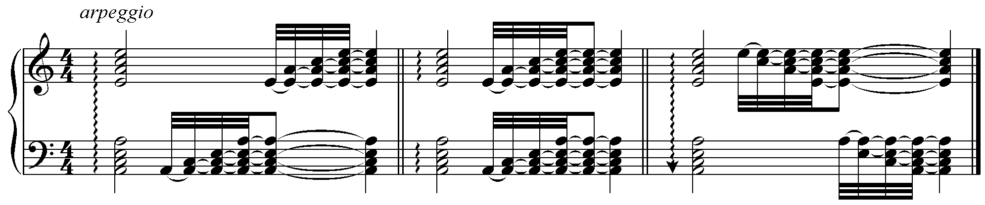 arpeggio